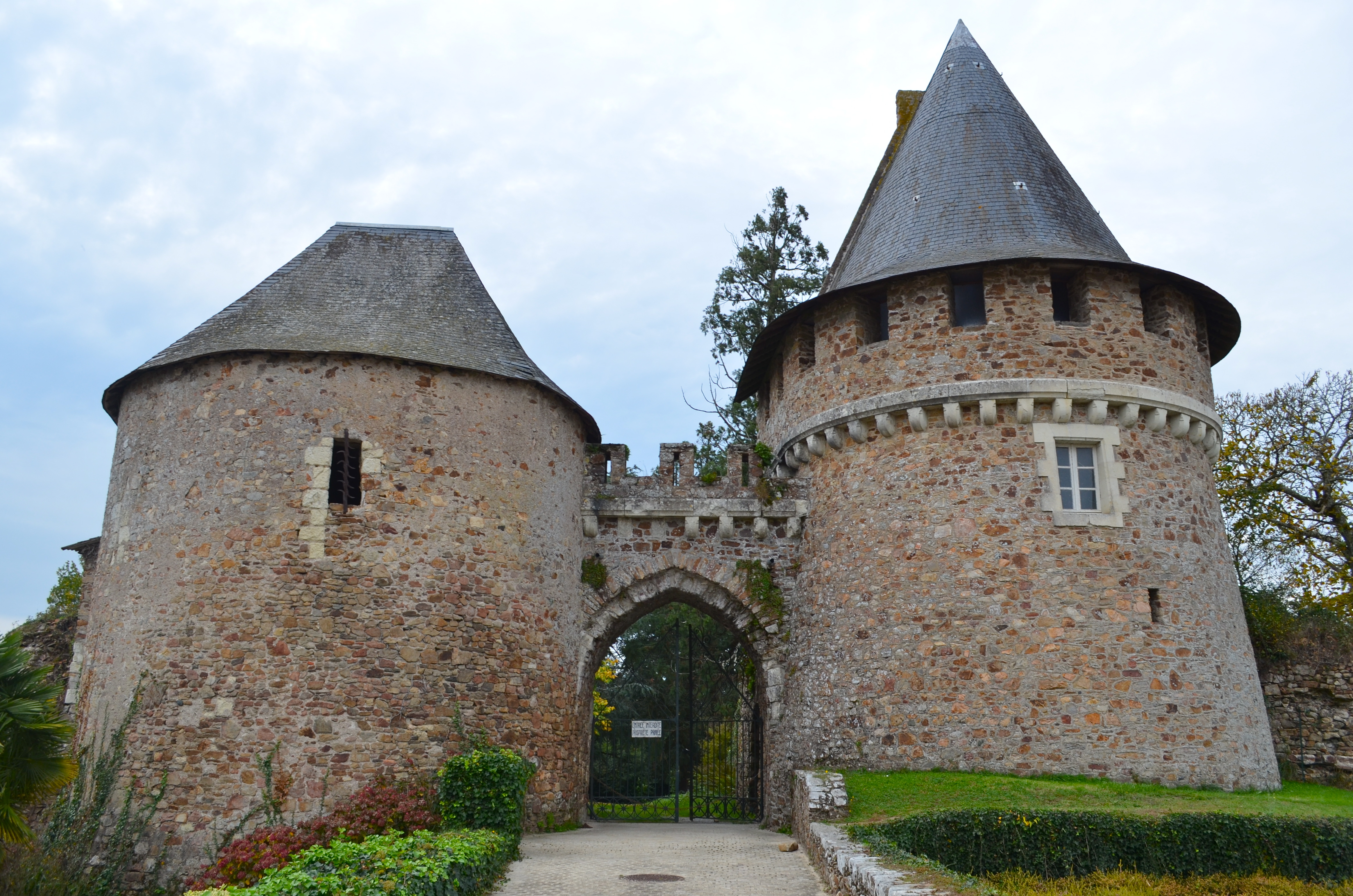 Porte du Château de Champtoceaux (Maine-et-Loire)